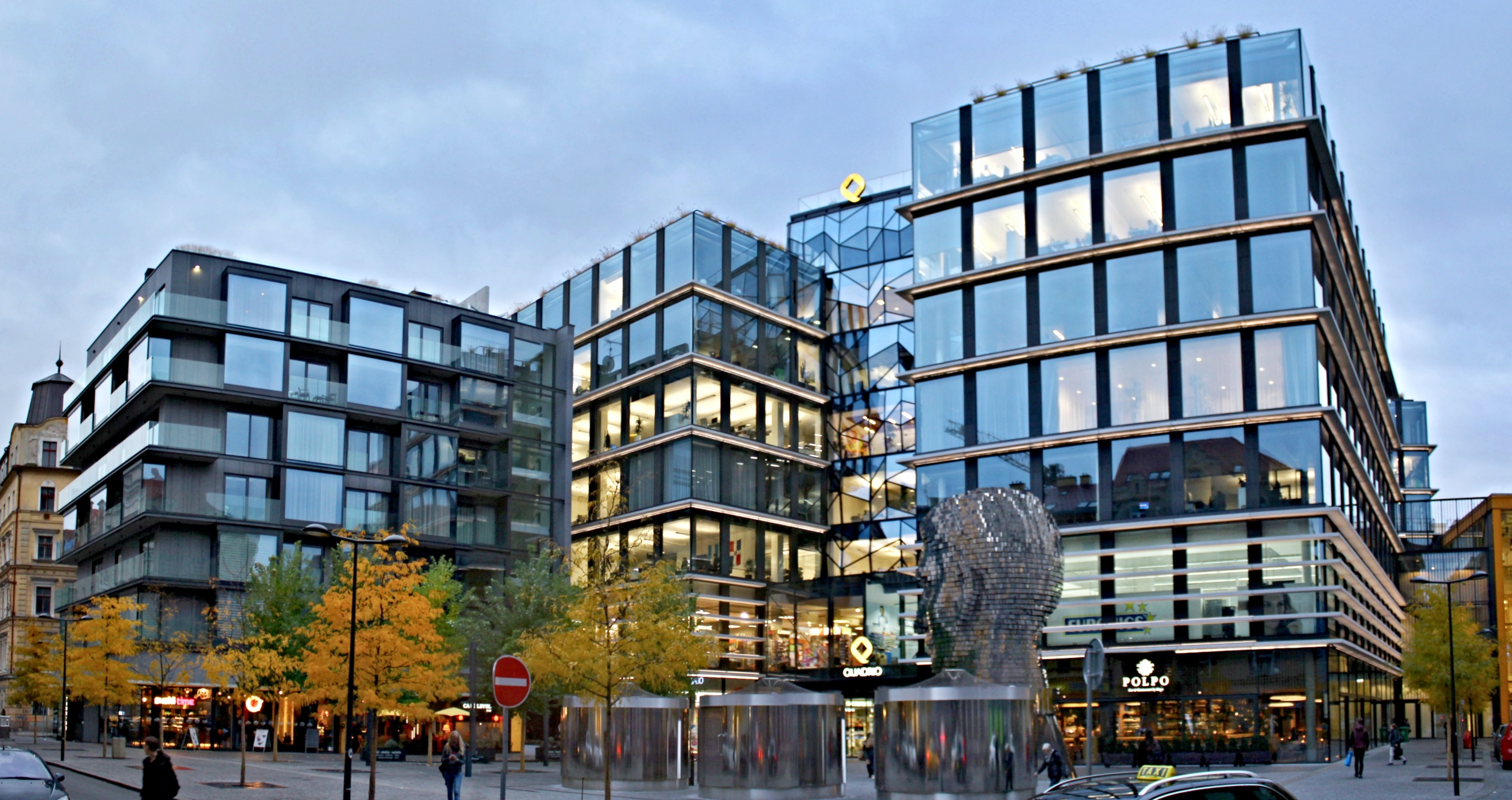 Obchodní centrum Quadrio